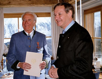 Martin Böttcher (links) erhält das Bundesverdienstkreuz Komponist Martin Böttcher erhält das Bundesverdienstkreuz vom deutschen Botschafter in der Schweiz, Dr. Frank Elbe am 25.01.2004